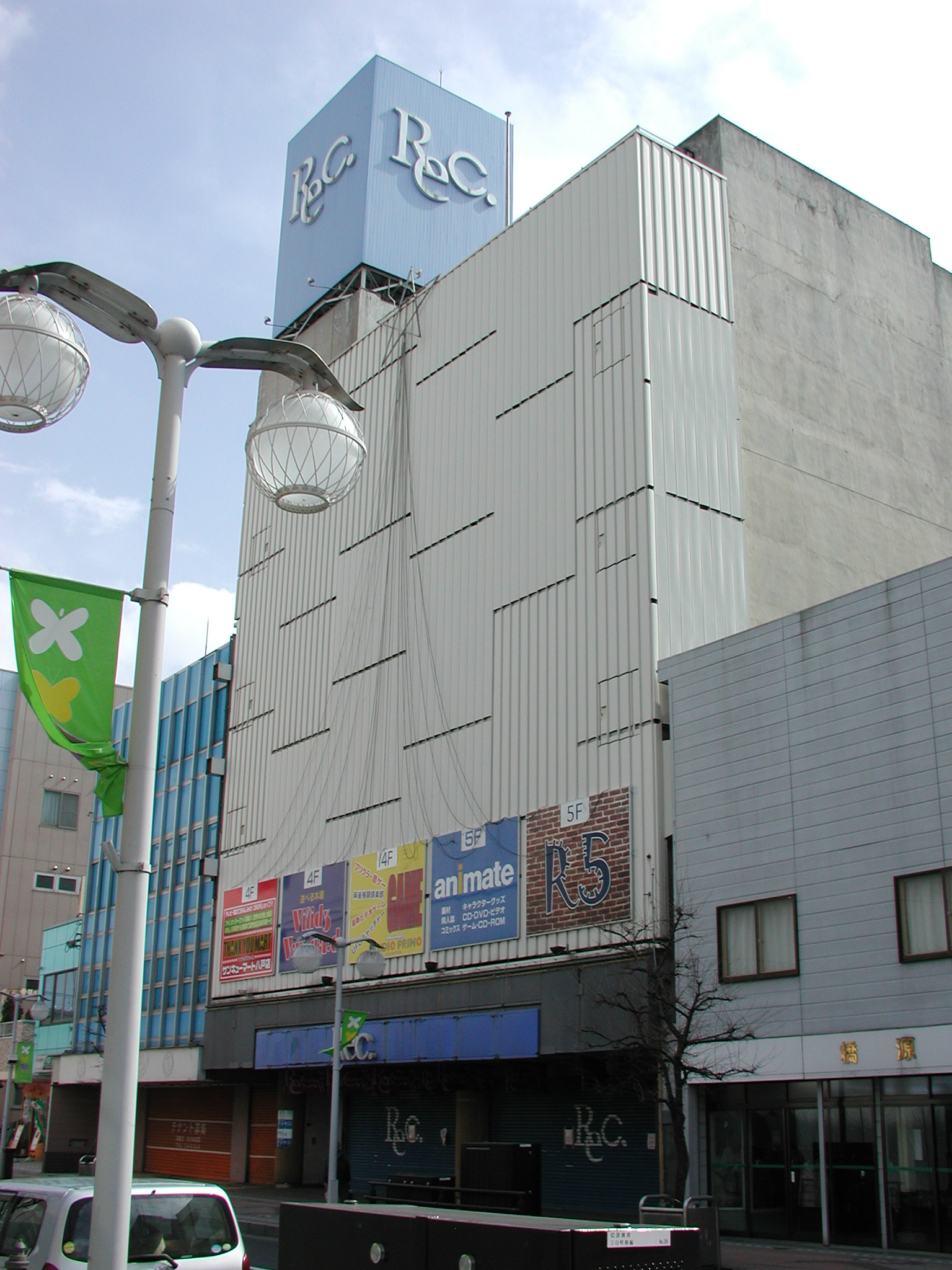 Rec.（レック）本館（第二松和ビル）：青森県ja:八戸市三日町 かつてはja:緑屋→WALKが入居されていた。後にRec.に改称されたが、テナント運営会社が2007年7月に自己破産を申請したため、テナントが順次立ち退かれ、最後に残ったテナント店が2008年1月までに撤退して閉鎖した（ただし地下部分についてはビル所有者からの賃貸により当分の間は営業を継続している）。